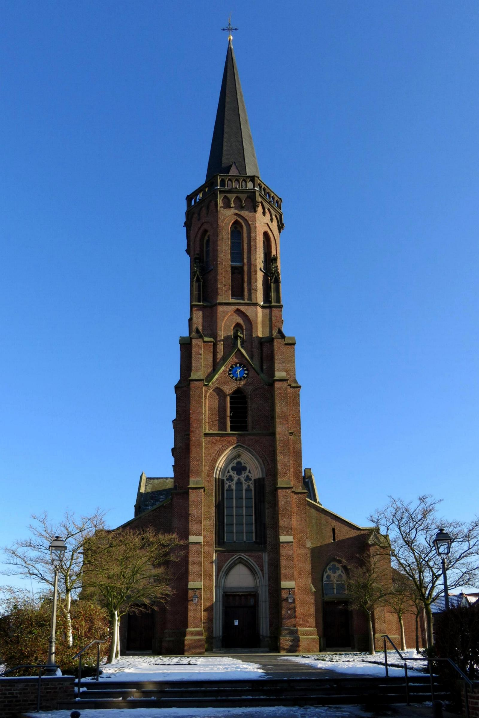 Kirche in Braunsrath